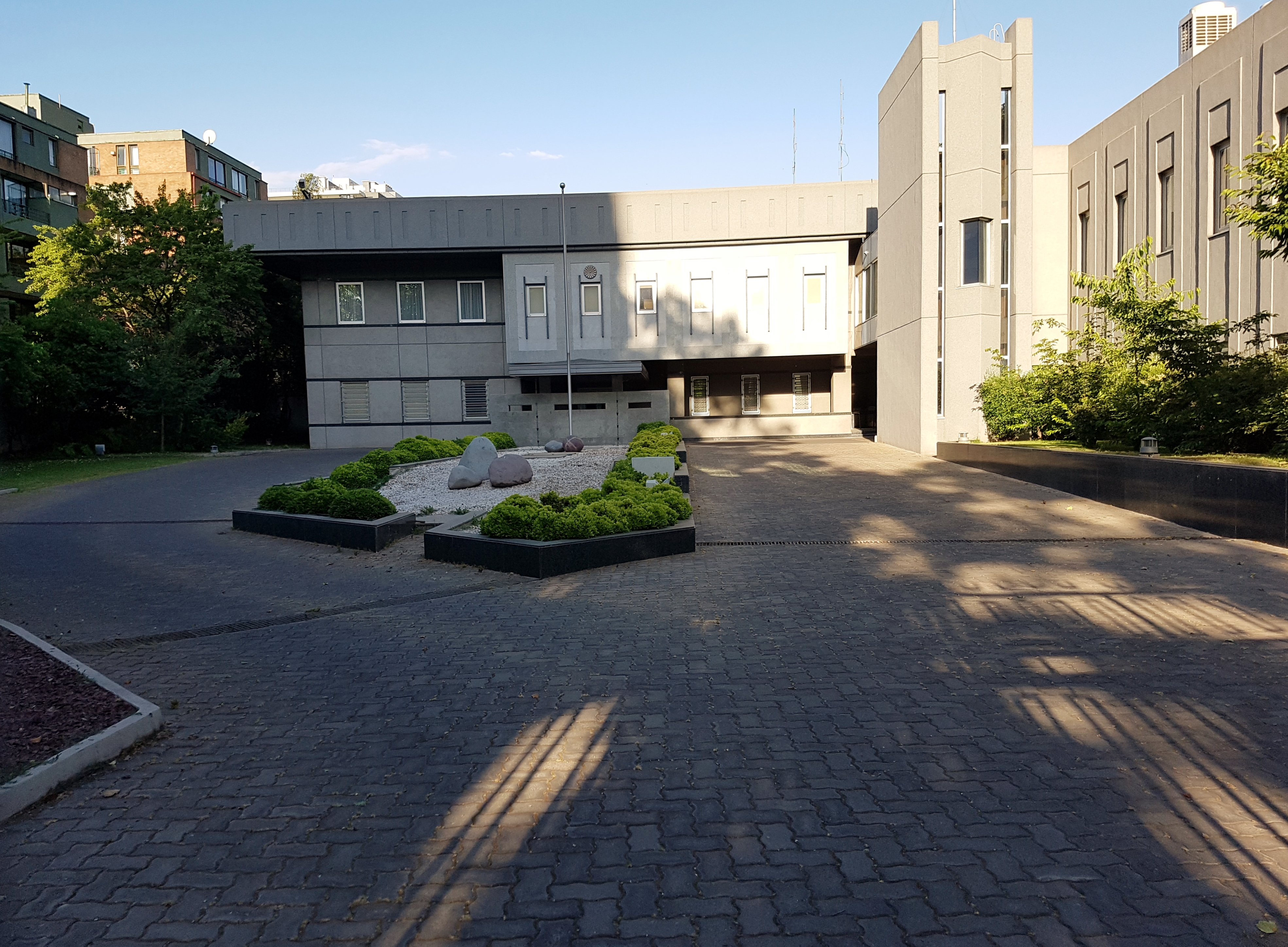 La embajada de Japón en Santiago de Chile; avenida Ricardo Lyon, comuna de Providencia.